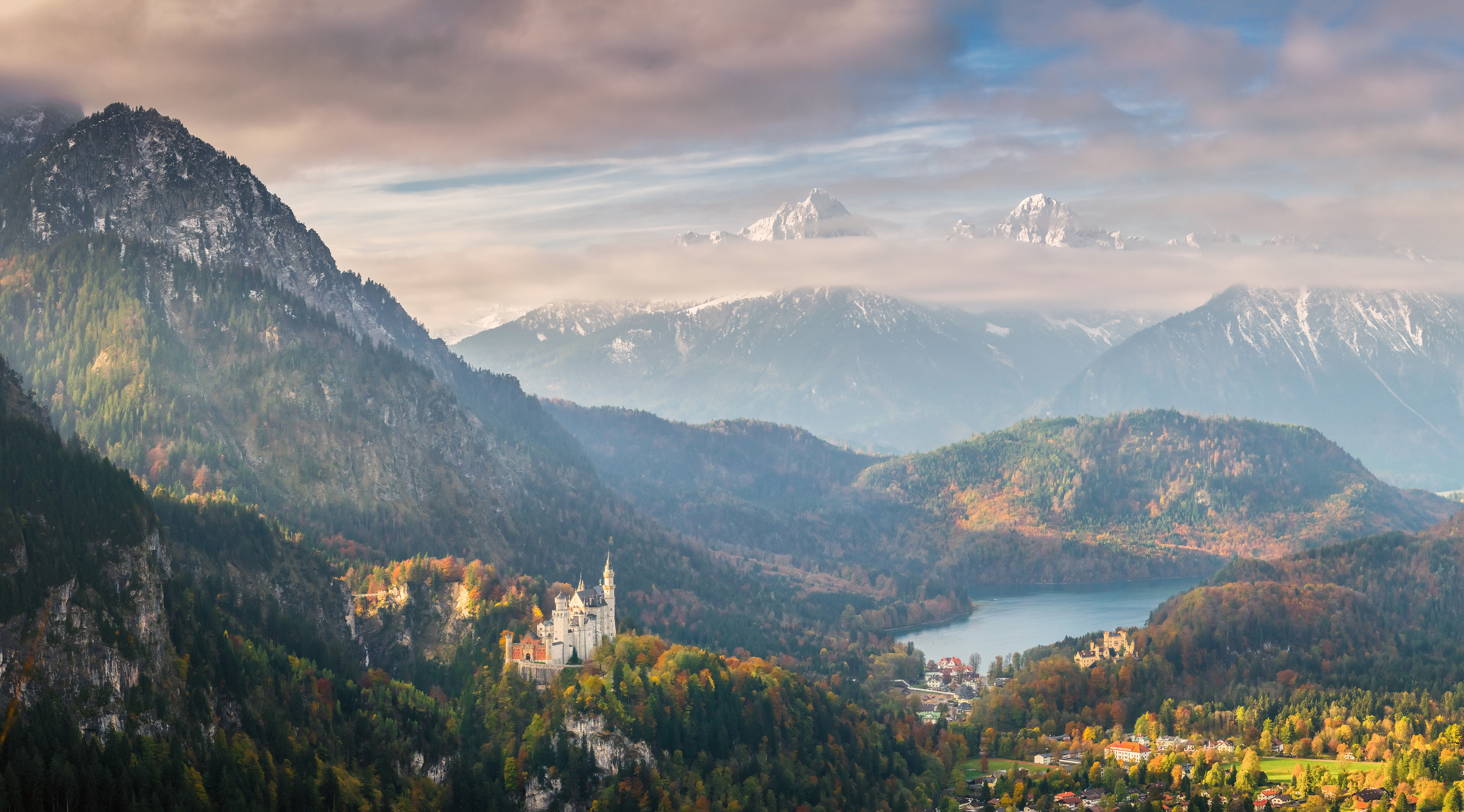 Alpsee, Schloss Neuschwanstein